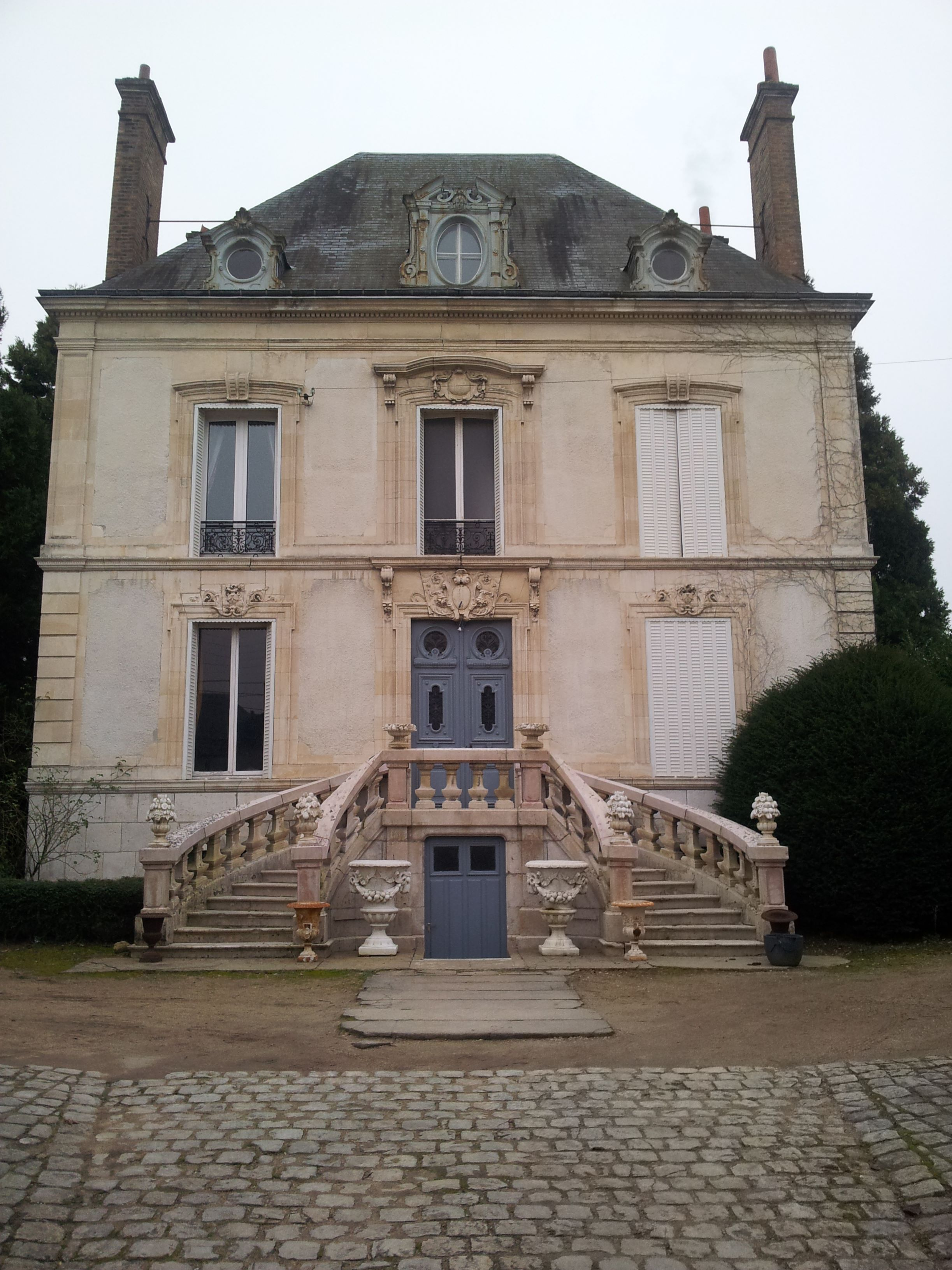 150 Faubourg Bourgogne, St Jean de Braye